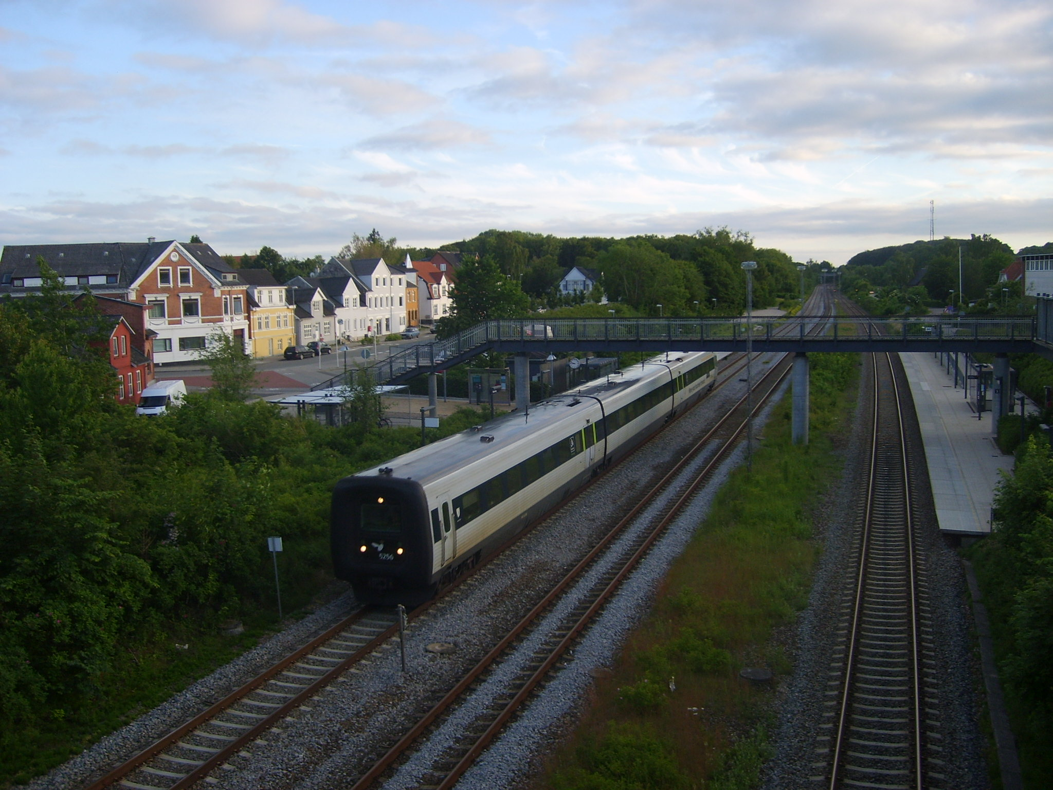 Train station in Hørning, Denmark.